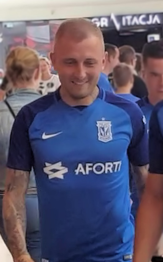 Deniss Rakeļs, Piłkarz zespołu Lech Poznań, prezentacja w CH Posnania